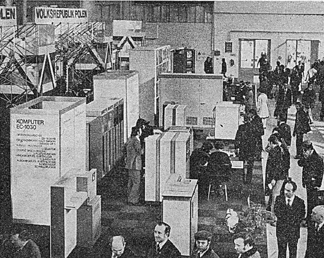 R-30, EC 1030, Targi Lipsk, stoisko PRL